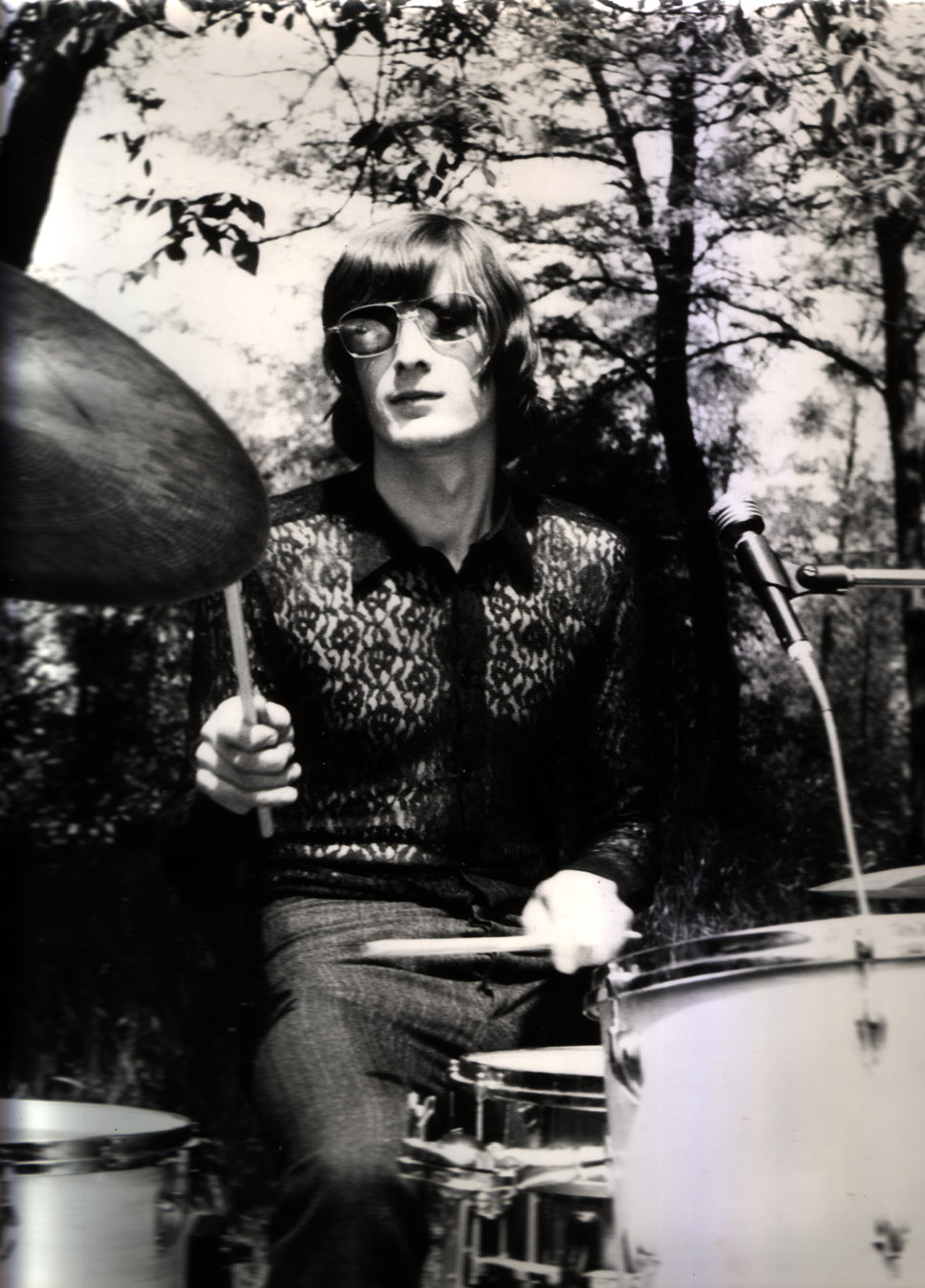 Asim Mujevic Kragujevac